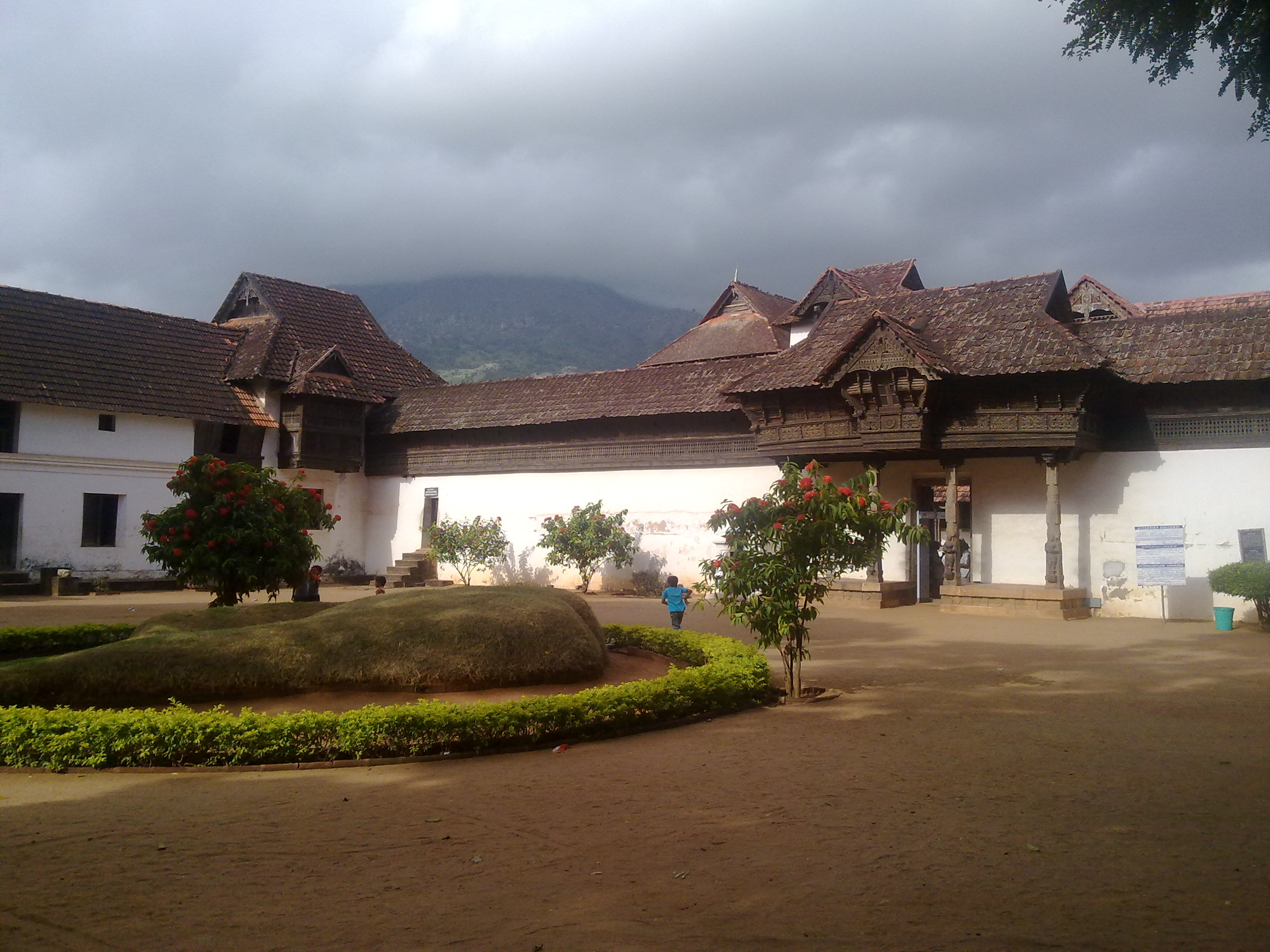 പത്മനാഭപുരം കൊട്ടാരം, കന്യാകുമാരി, മുൻ‌വശത്തുനിന്നുമുള്ള ദൃശ്യം